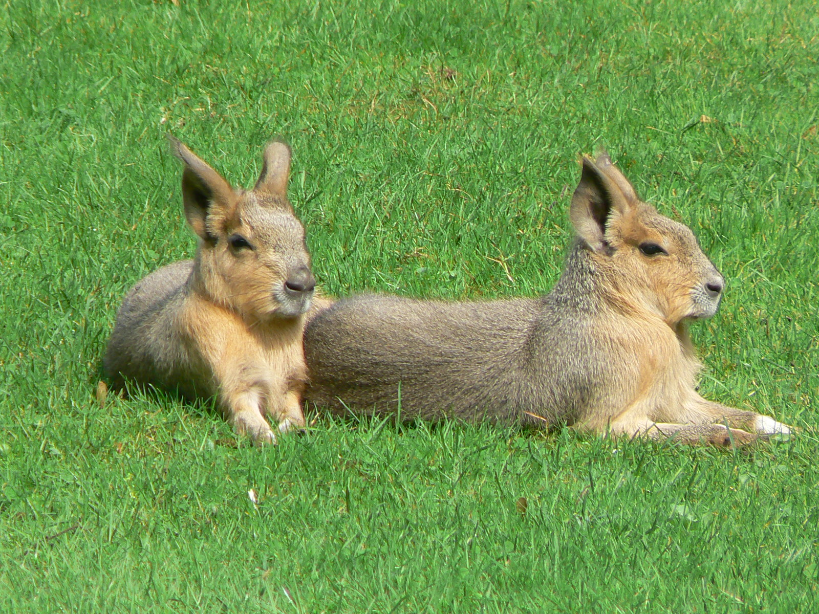 Dolichotis patagonum / Mara / Patagonian cavi / pampashase